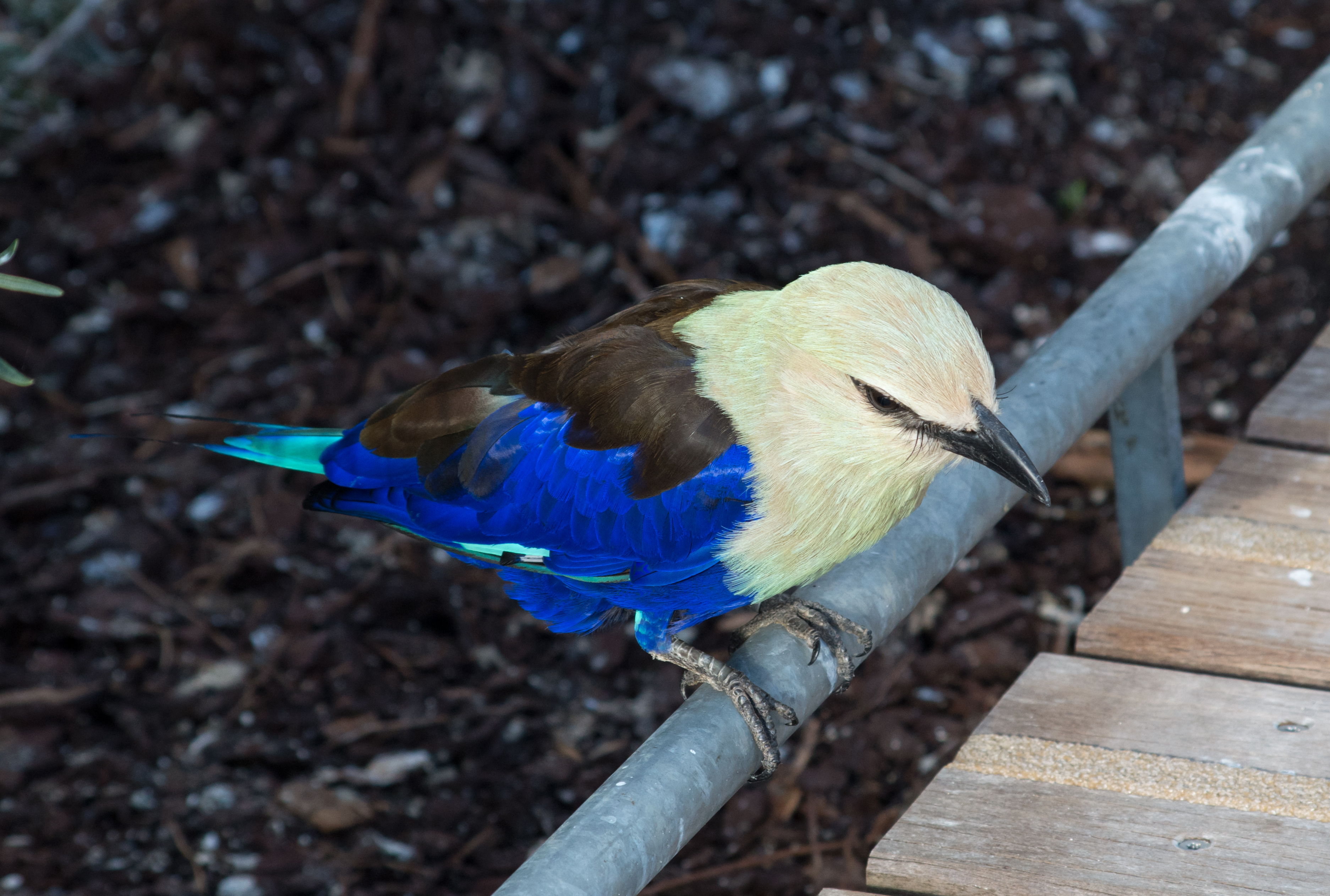 Coracias cyanogaster - Volière du zoo de Vincennes